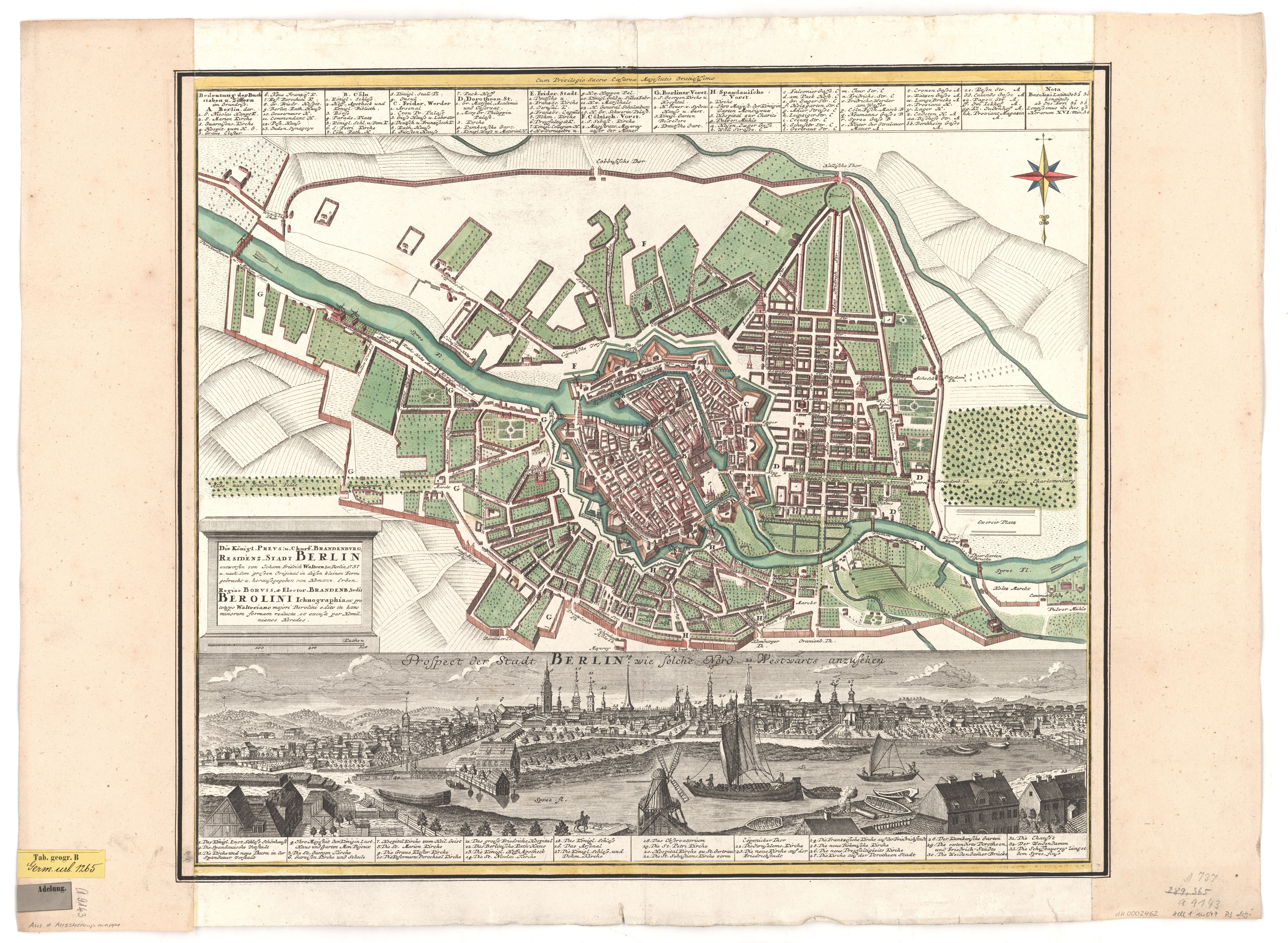 Präzise verkleinerte Kopie des Plans von J.F. Walther von 1737. Links unten ein Block aus Steinplatten mit dem Titel (deutsch und latein); im Sockel ein Maßstab über 300 Ruthen; über der Karte eine Legende und Angaben zur geografischen Länge und Breite; rechts oben eine Windrose.